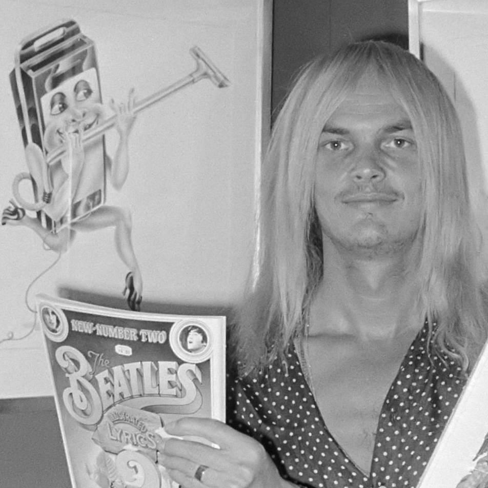 Alan Aldridge met posters en schilderijen in Bijenkorf 23 juli 1971